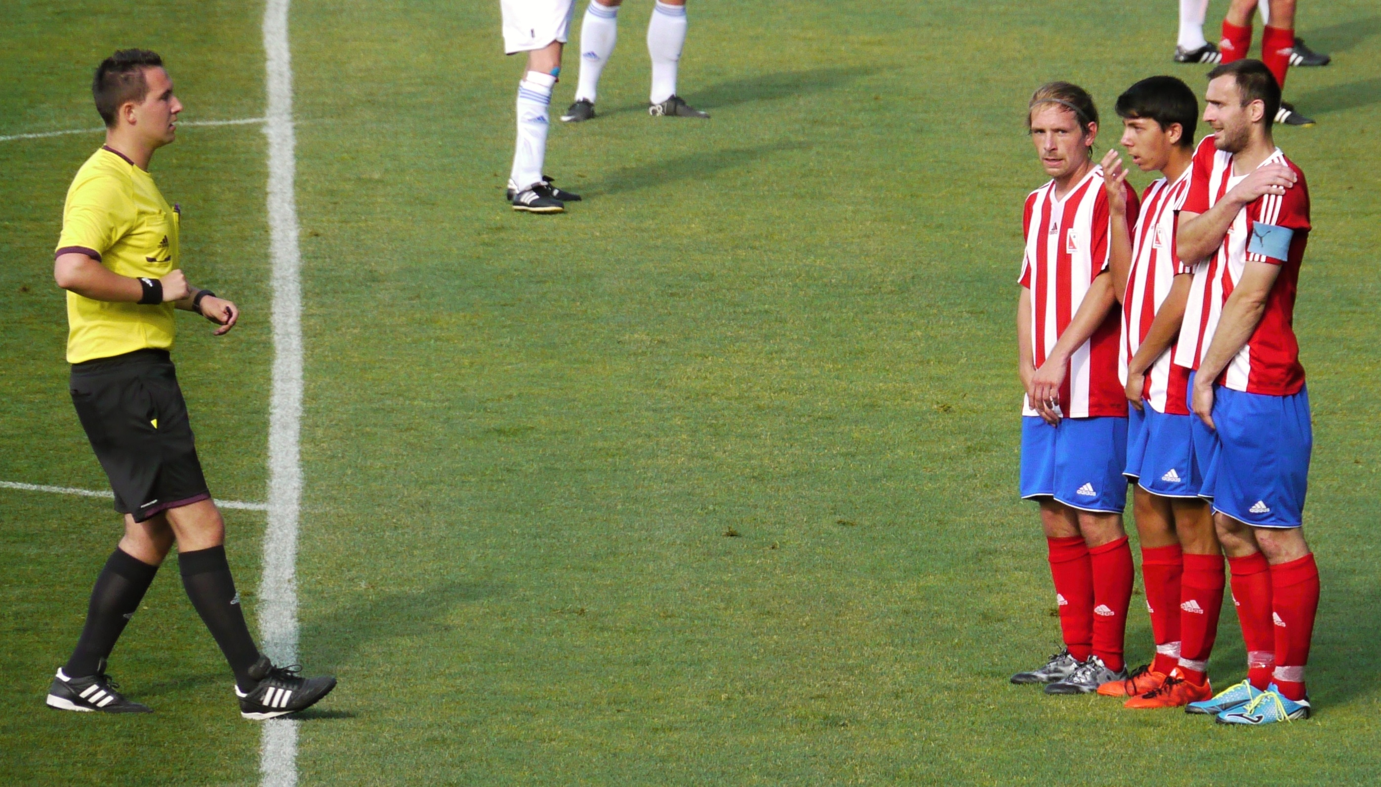 Kapitán při utkání Pohár FAČR